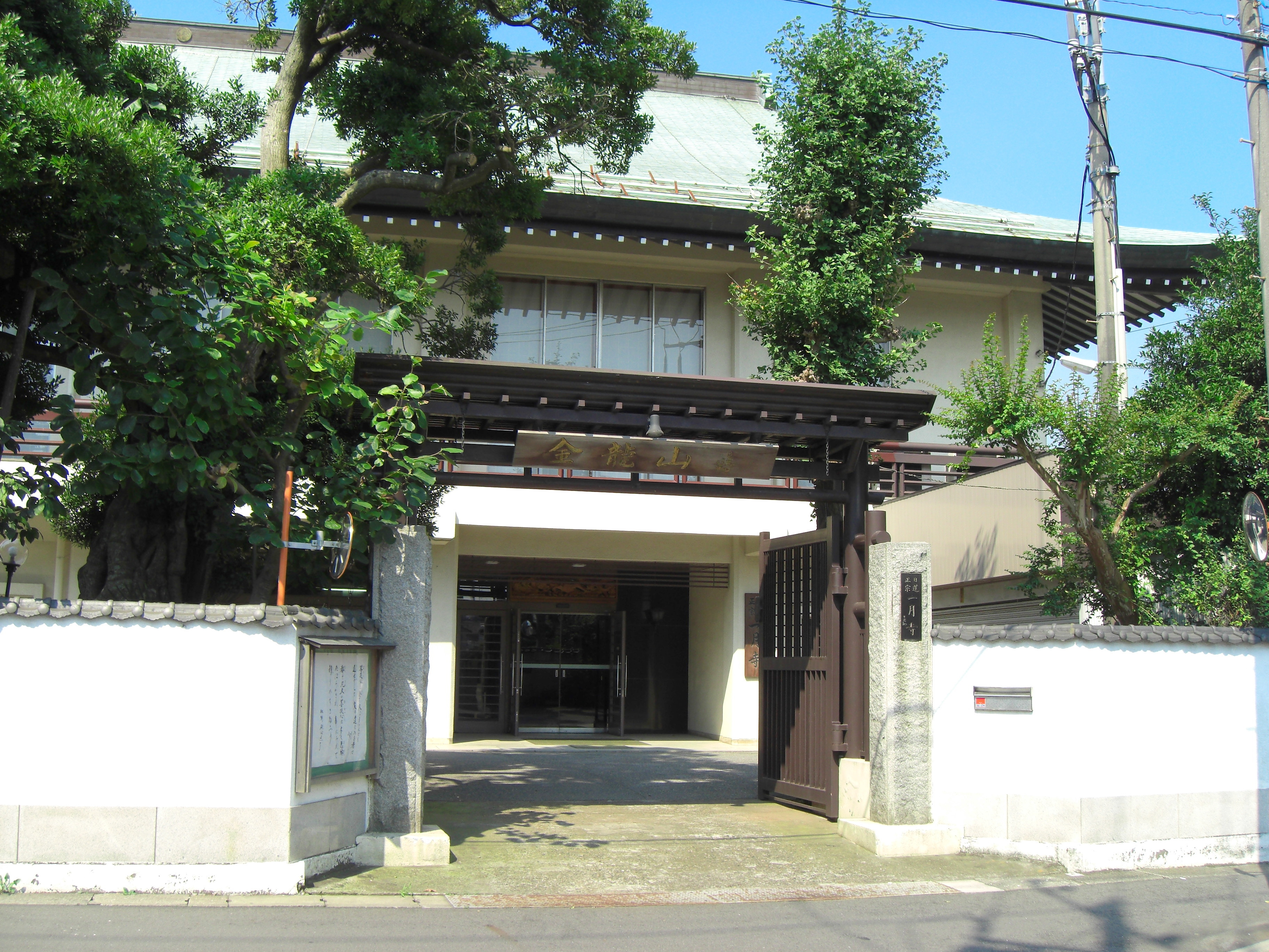 Ichigatsuji